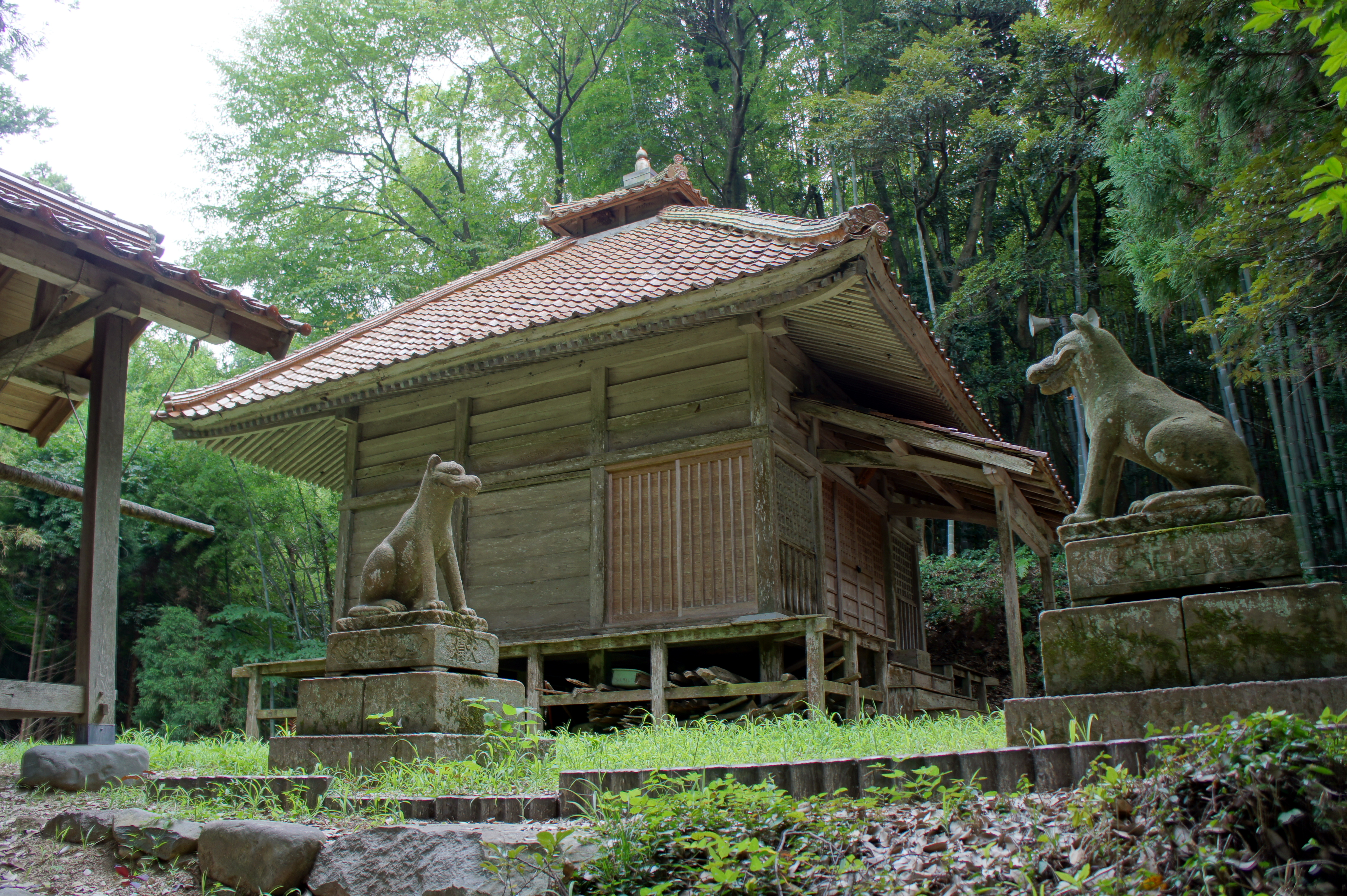 智積寺本堂（鳥取県東伯郡琴浦町）